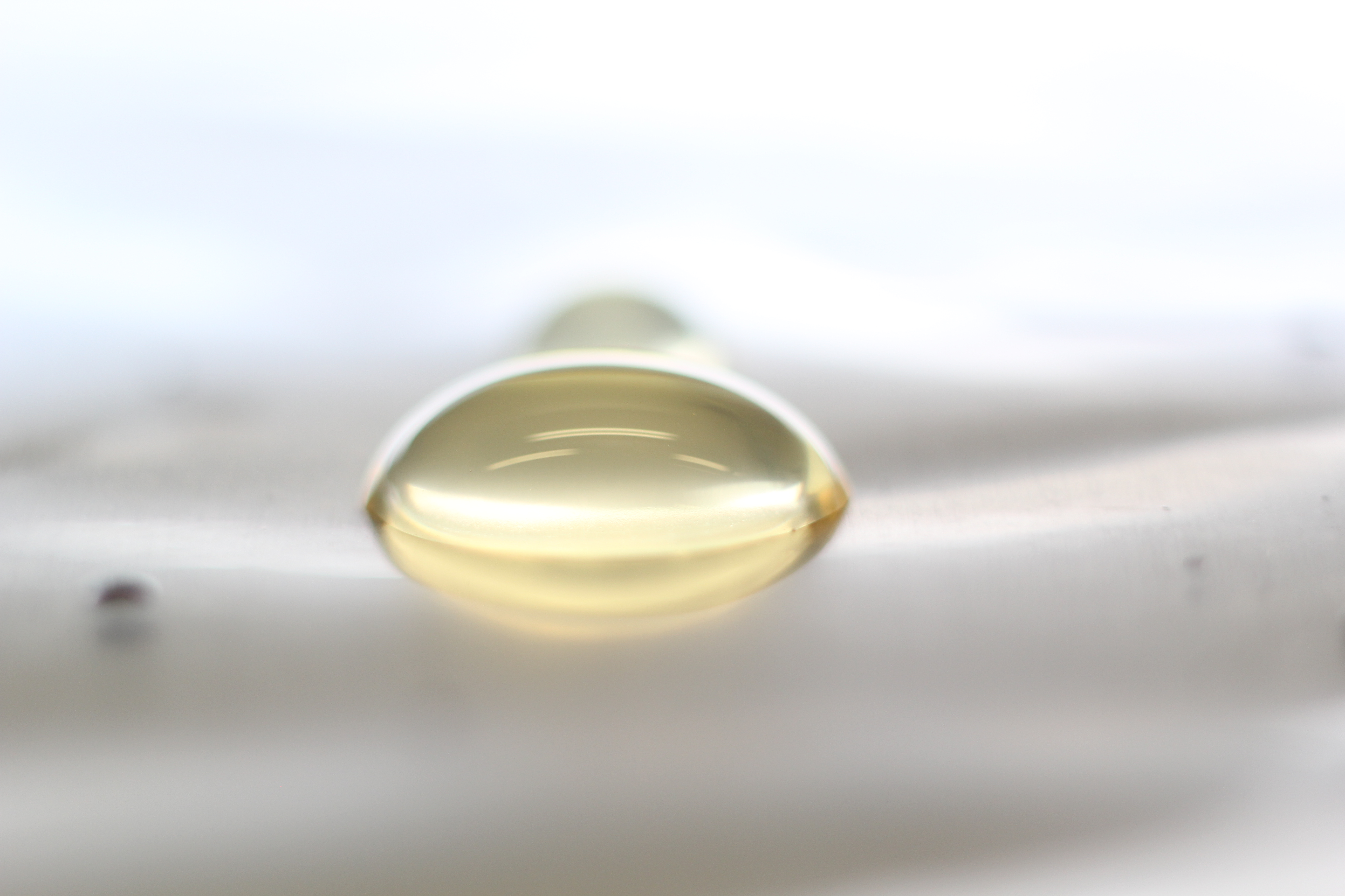 Ioonne vedelik tilgutatud polüetüleenist valmistatud minigripikotile. Pildi tegemisel kasutatud välku. Foto on tehtud TÜ Tehnoloogiainstituudi 3. korruse laboris tõmbe all.